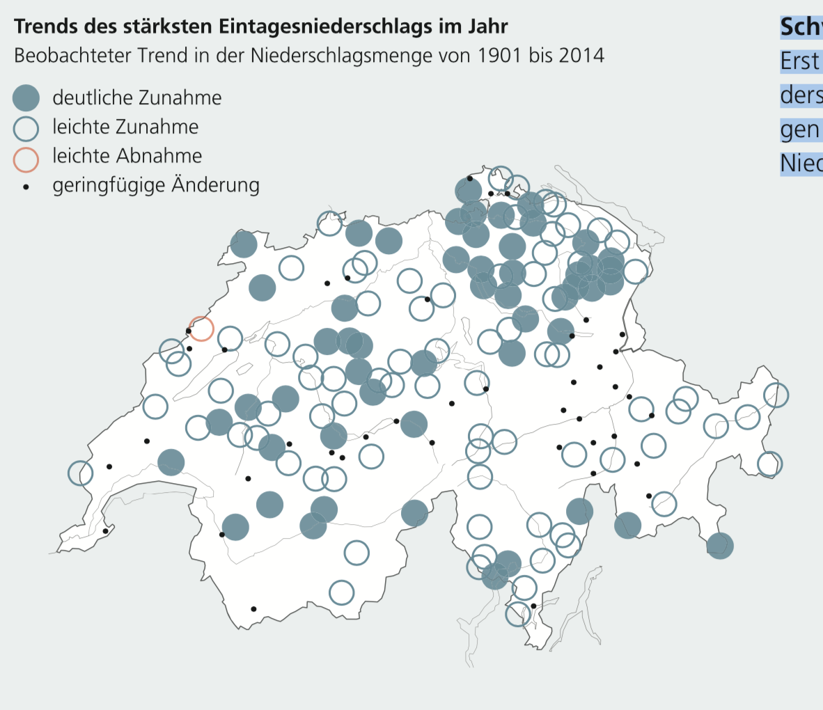 Klima in der Schweiz. Eintagsniederschläge Schweiz. NCCS (Hrsg.) 2018: CH2018 – Klimaszenarien für die Schweiz. National Centre for Climate Services, Zürich.